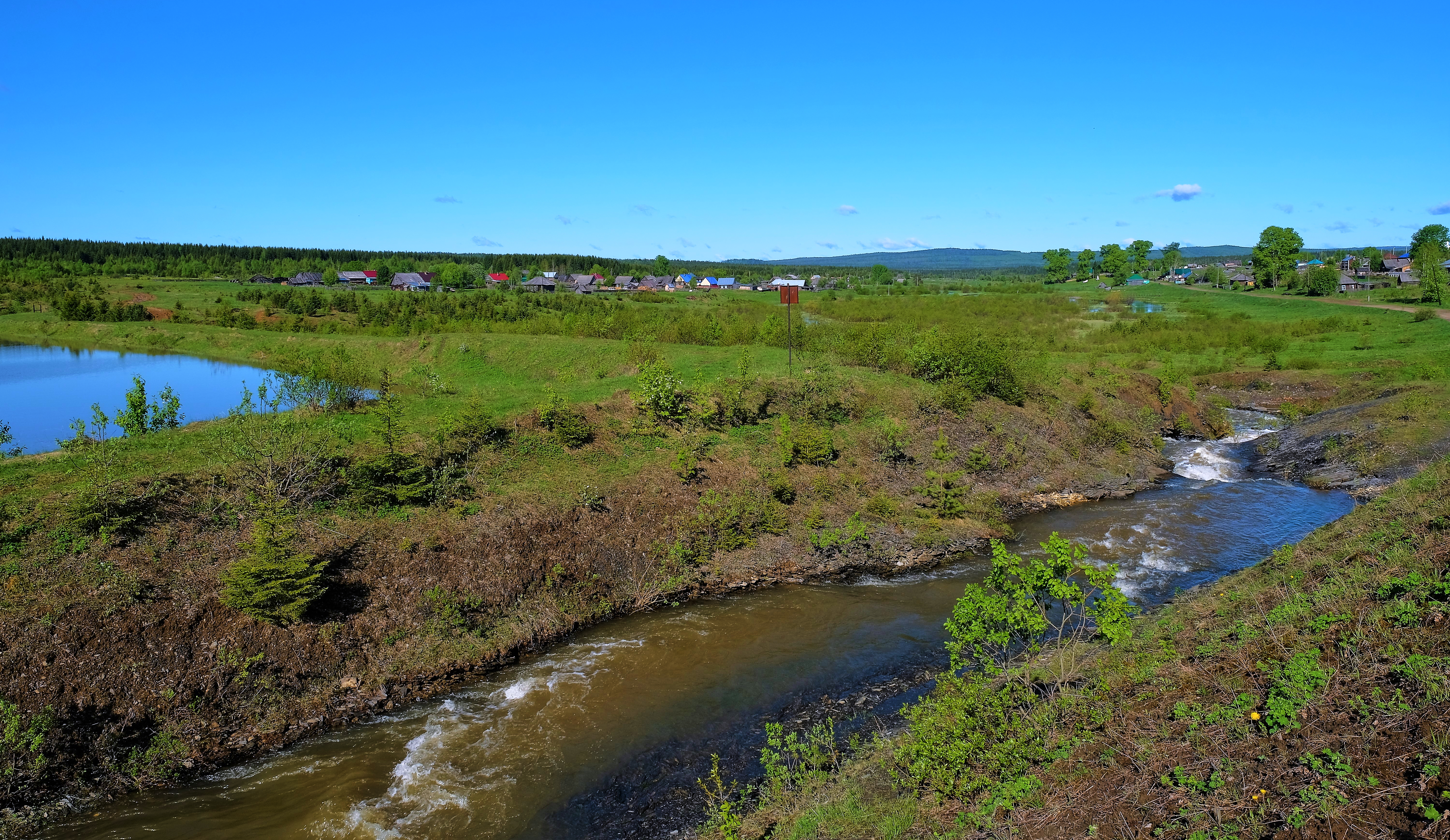 Рабочий посёлок Промысла (Горнозаводский район Пермского края). Пруд на реке Полуденка.